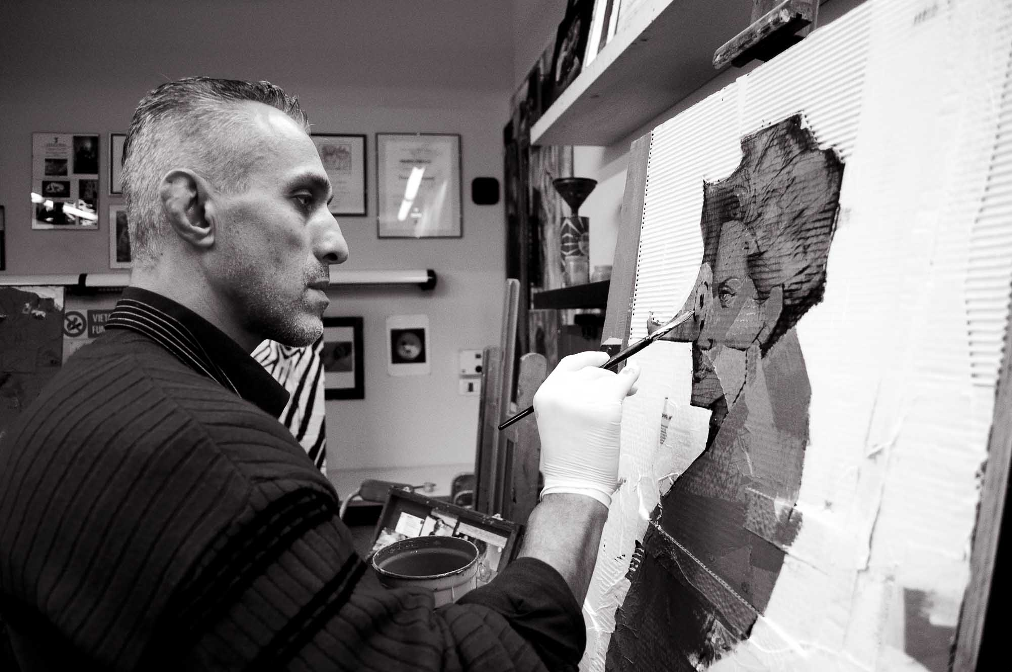 Particolare...